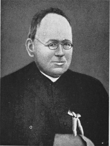 Painting of Peter Karl Aloys Kreutzwald